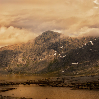 Vistkjerringa, et av de mest markerte fjellene i Lomsdal-Visten nasjonalpark.